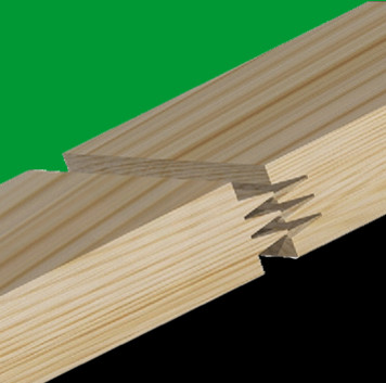 Positiv-Negativ Keilzinkenprofil